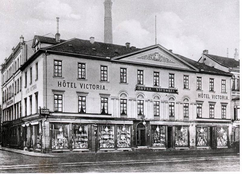 Das ab 1821 von Laves für die spätere Äbtissin Caroline von Bremer an der Georgstraße Ecke Windmühlenstraße errichtete Haus vom Bremer wurde nach dem Tod der Adeligen und dem Verkauf an Klävemann umgebaut und erweitert. In den oberen beiden Etagen war das „Hotel Victoria eingerichtet, während im Erdgeschoss Ladengeschäfte mit großen Schaufenstern um Kundschaft warben. Das Gebäude wurde 1905 oder 1906 abgebrochen. An seiner Stelle wurde das heute denkmalgeschützte „Haus Friedrich-Wilhelm“ erbaut ...“